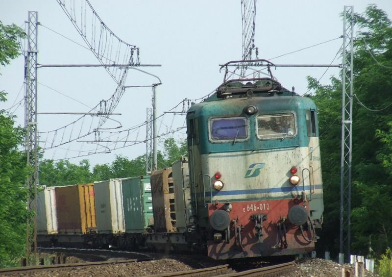 Locomotiva E.646 in testa ad un merci. Per gentile concessione dell'autore